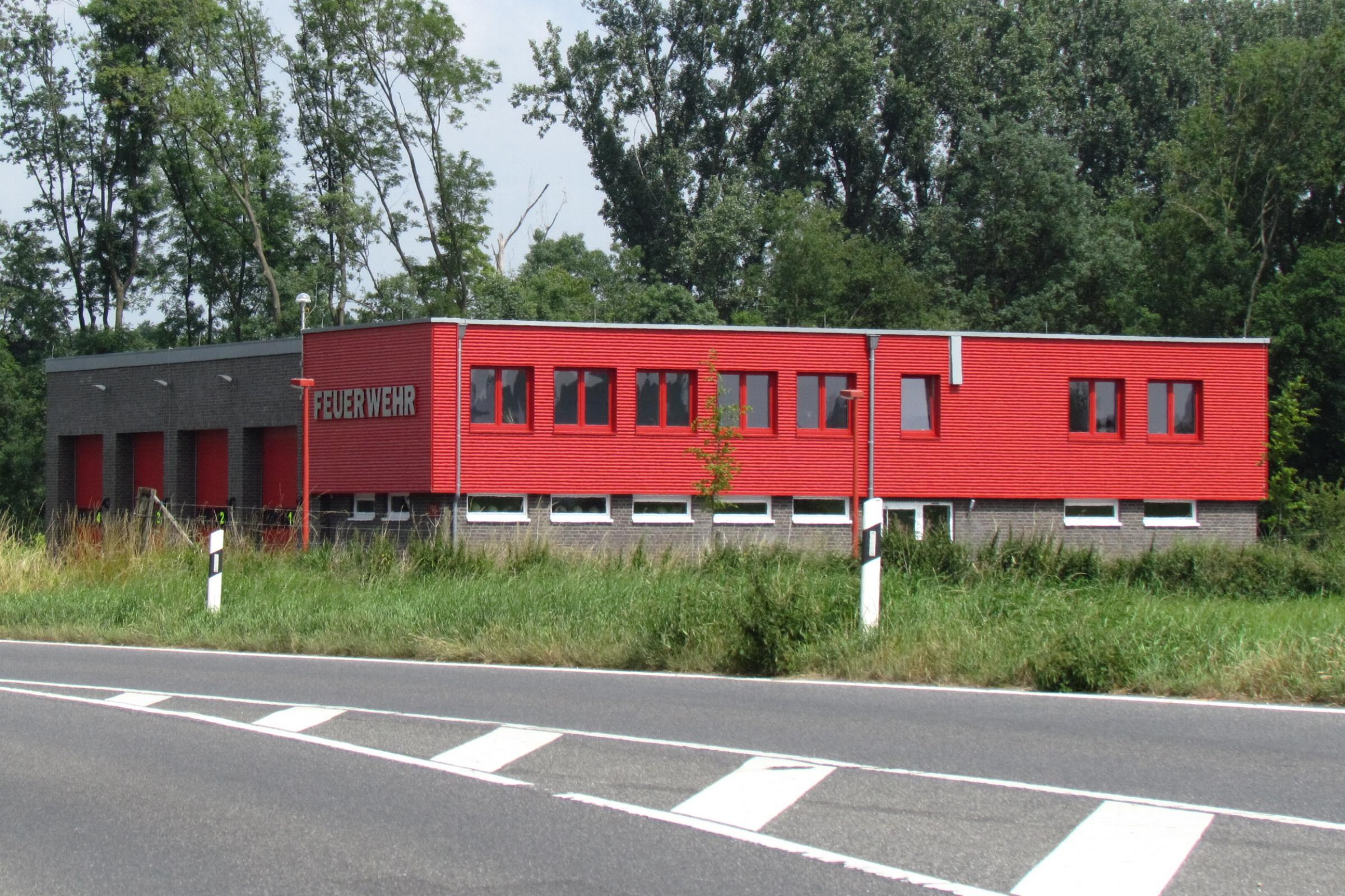 Hillensberg-Süsterseel Feuerwehr